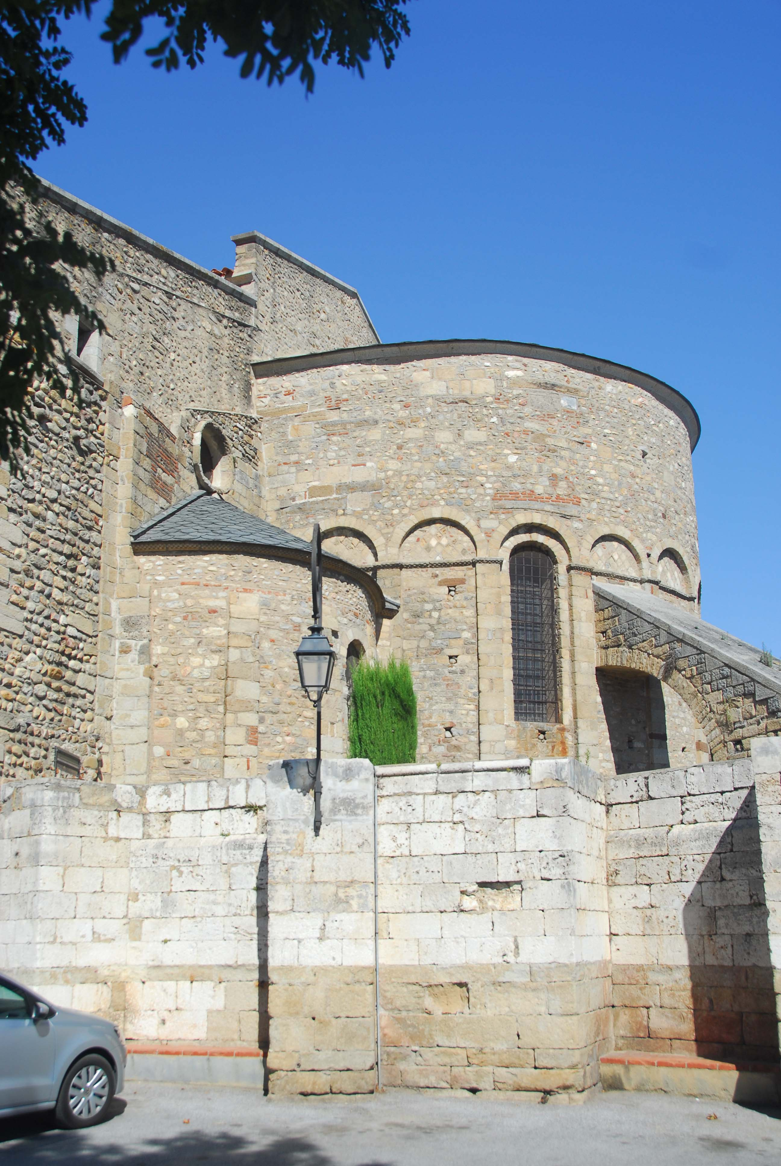 Ste-Eulalie-et-Ste-Julie_d’Elne, Chorhaupt von S